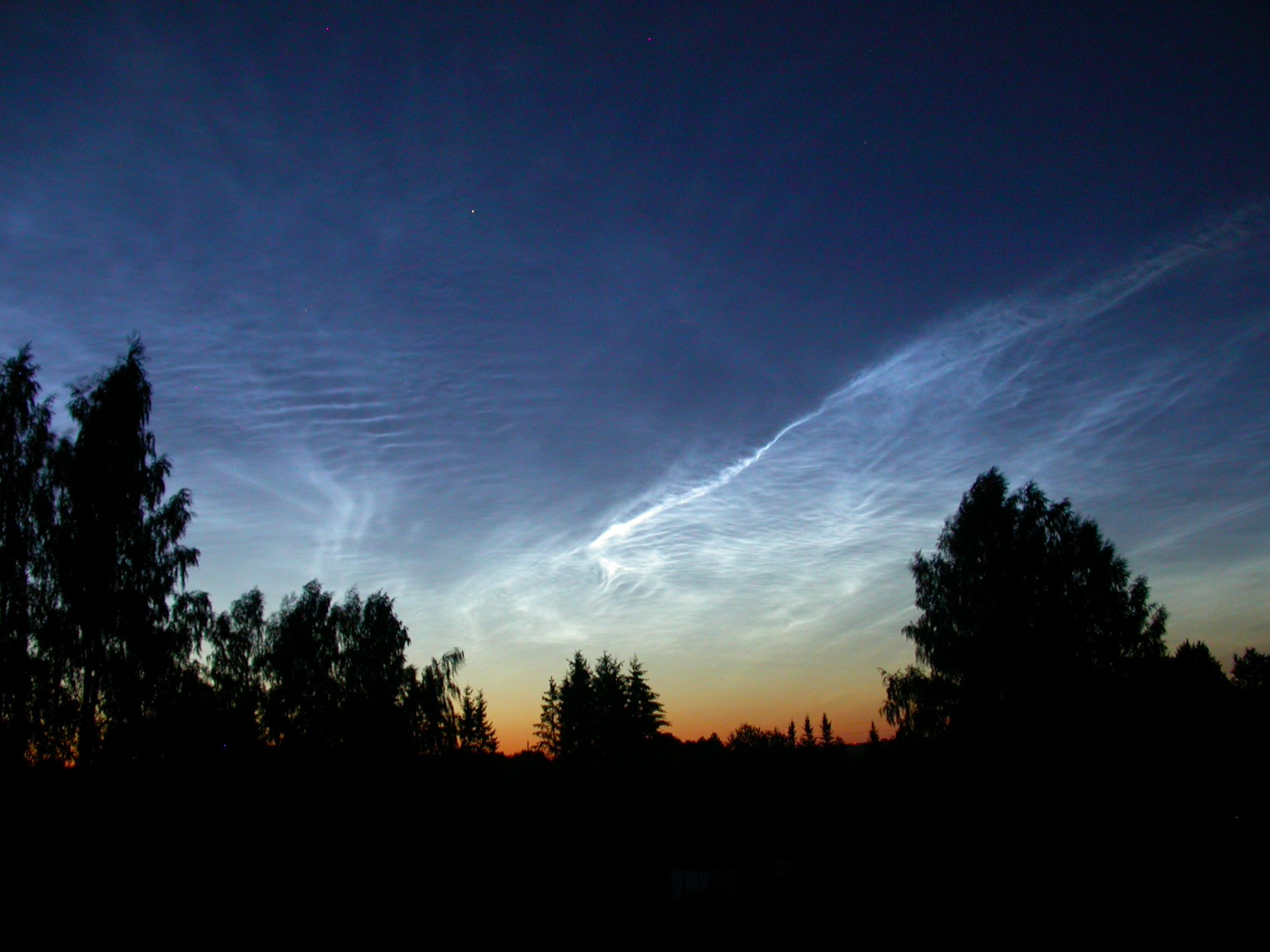 Helkivad ööpilved.